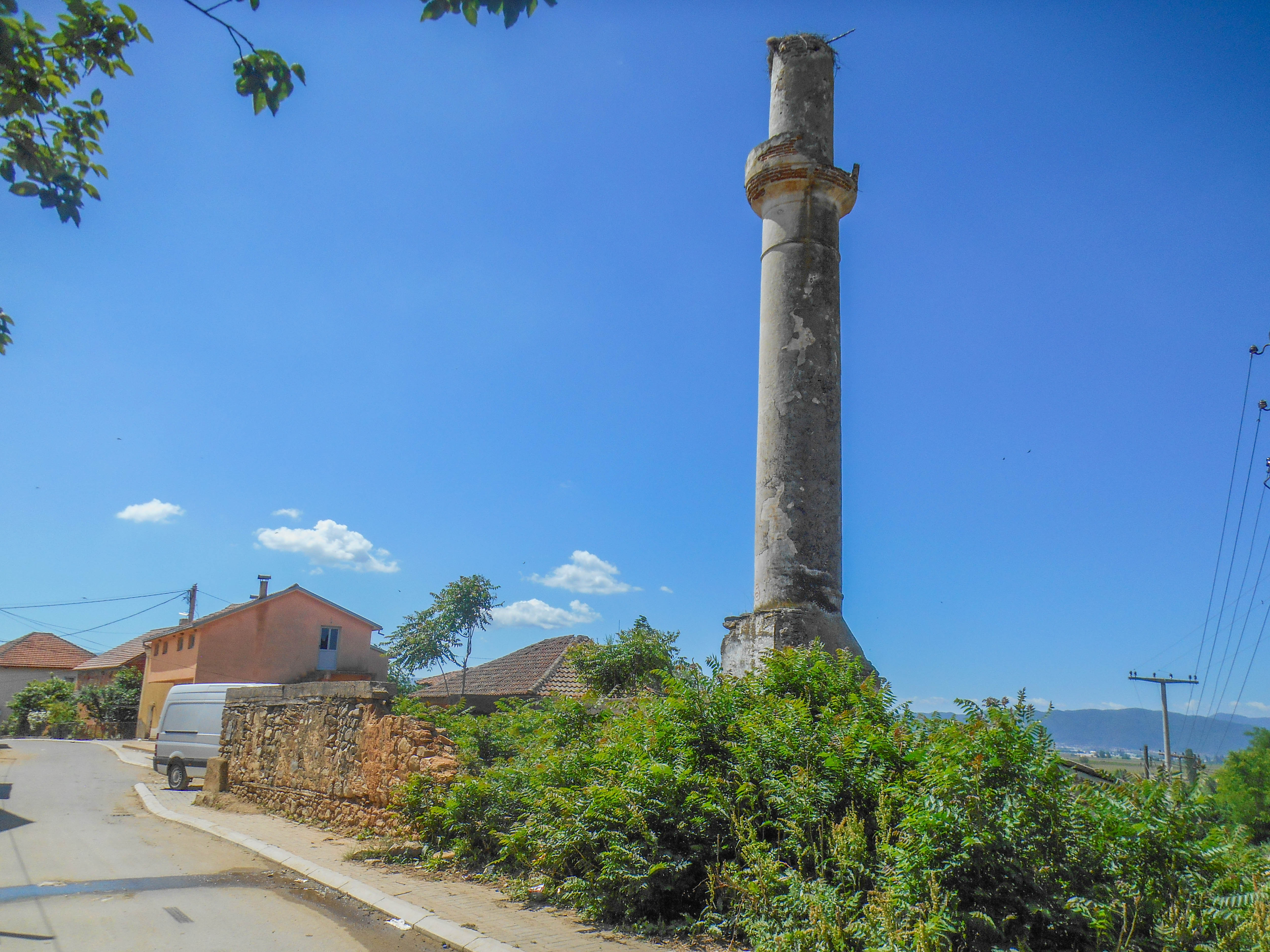 Џамија во Доброшинци